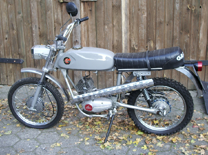 Garelli Cross KKR. Baujahr 1968. Eigenes Krad.